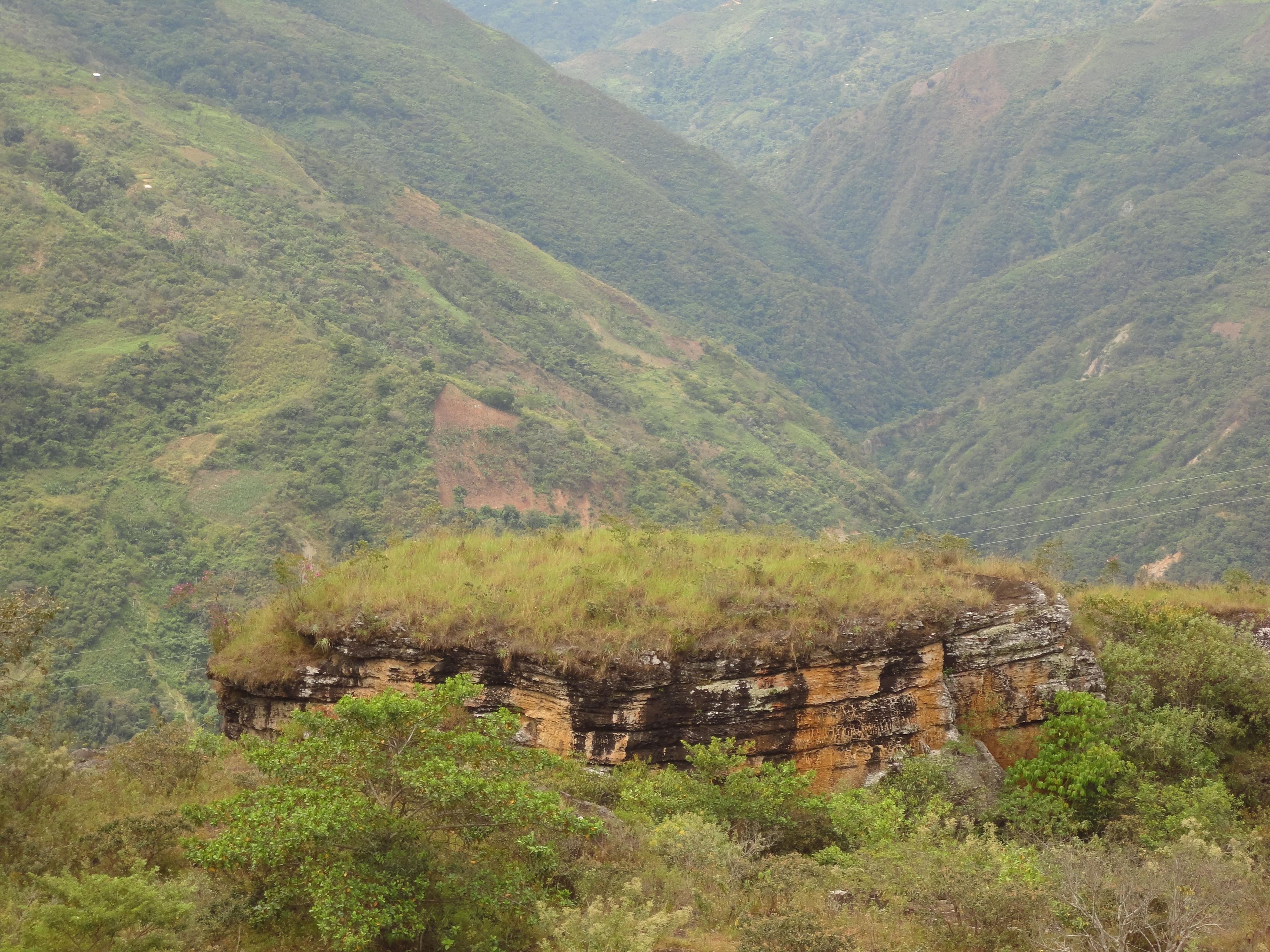 ESTE ROCA SE UBICA EN EL CENTRO POBLADO DE CALPON DISTRITO LONYA GRANDE PROVINCIA DE UTCUBAMBA. REGION DE AMAZONAS EN EL PERU SE DICE QUE ES UN POCO DIFISIL DE SUBIR